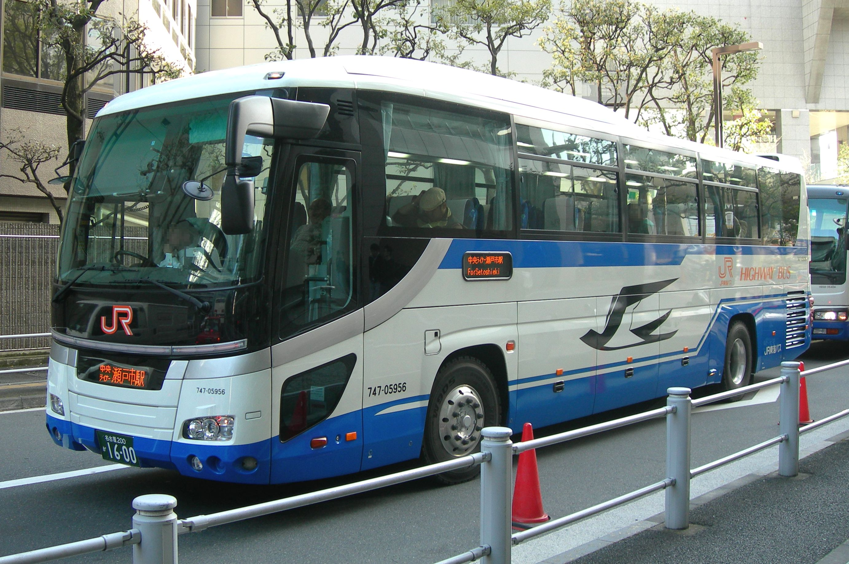 ジェイアール東海バス 中央ライナー